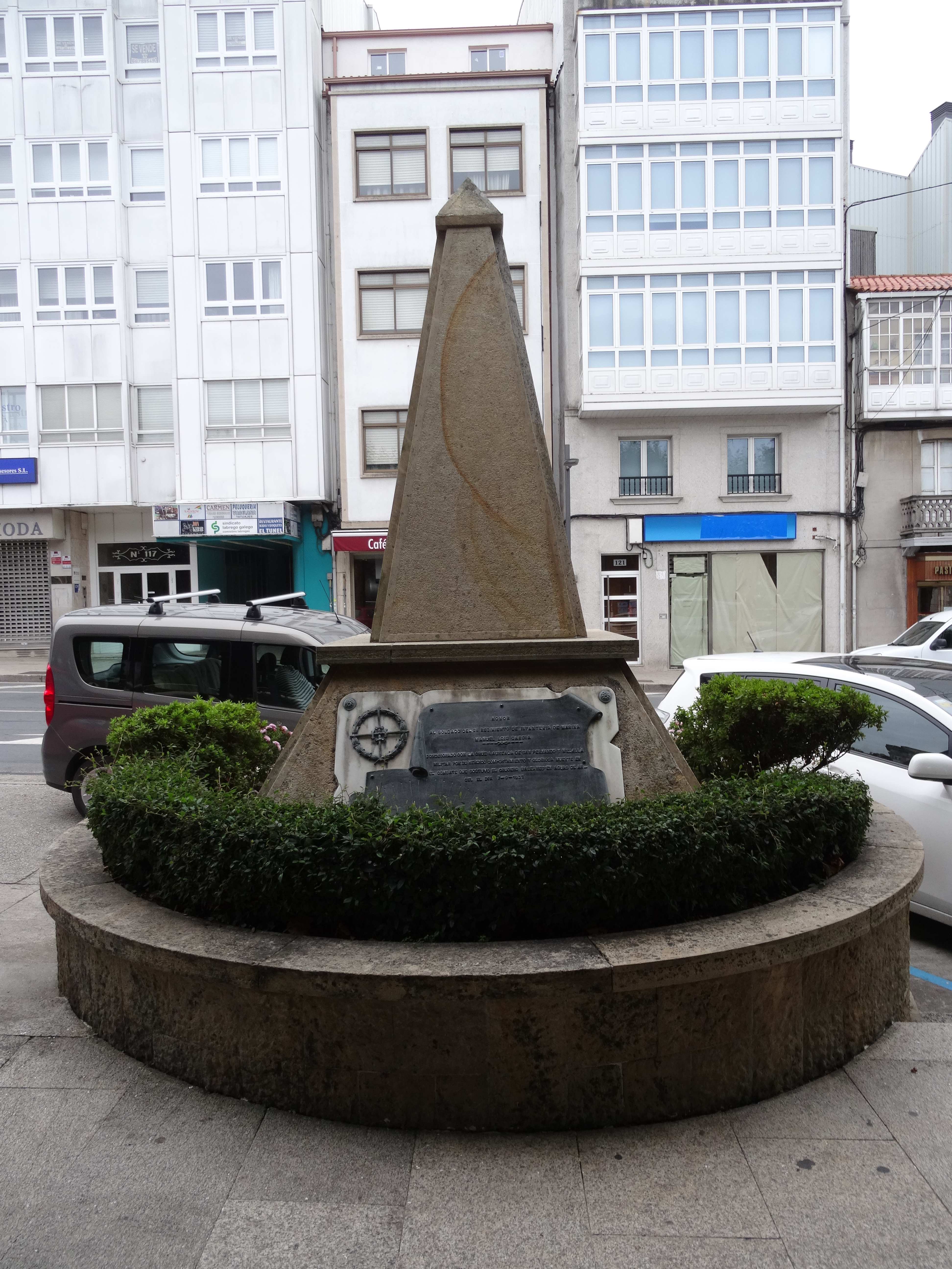 Ver título.